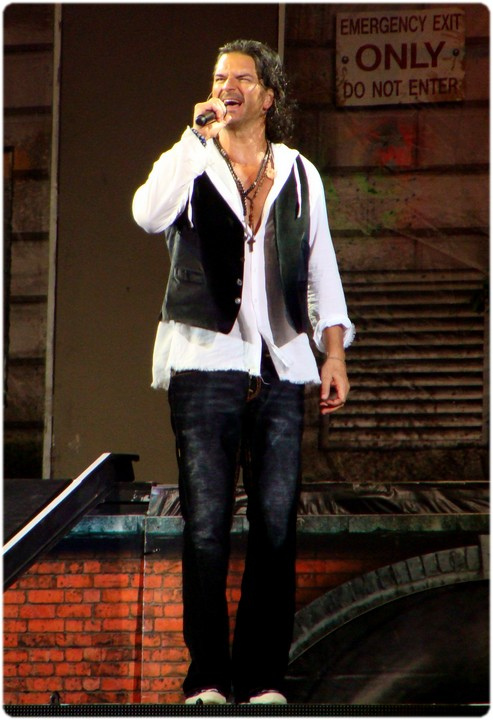 Ricardo Arjona en Viña del Mar 2010